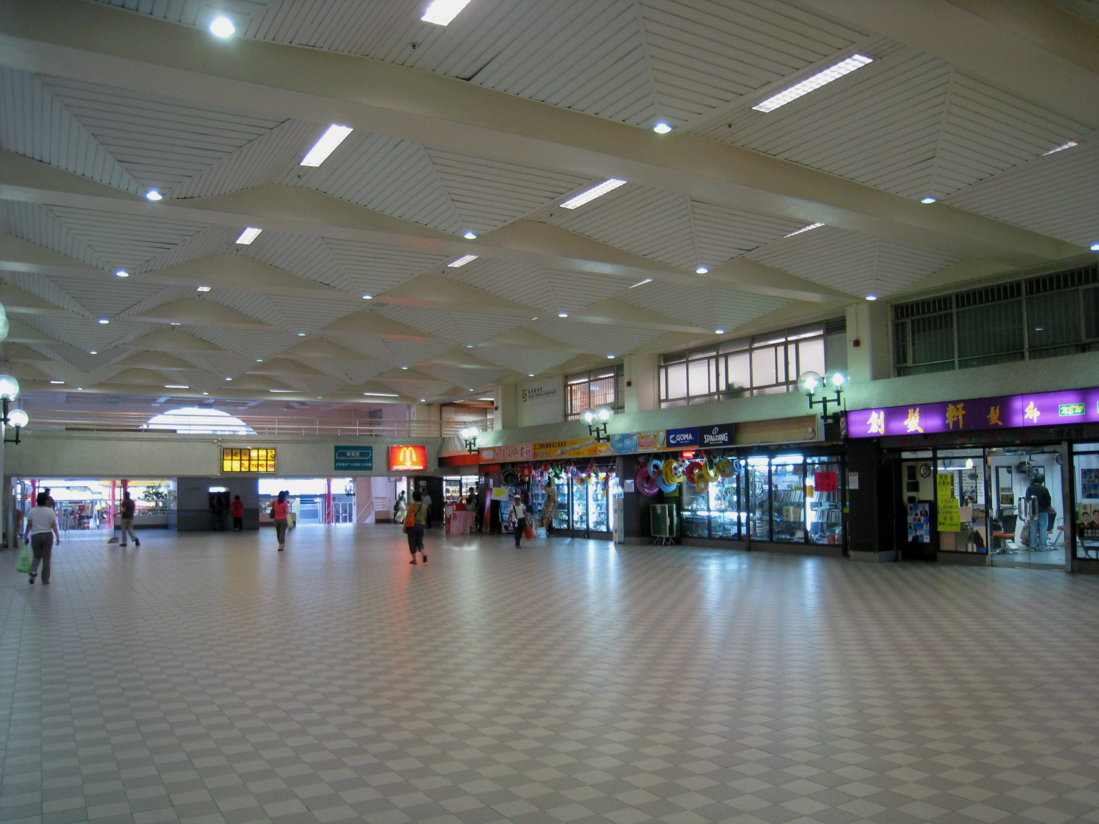 Tin Ping Estate Shopping Centre 天平商場